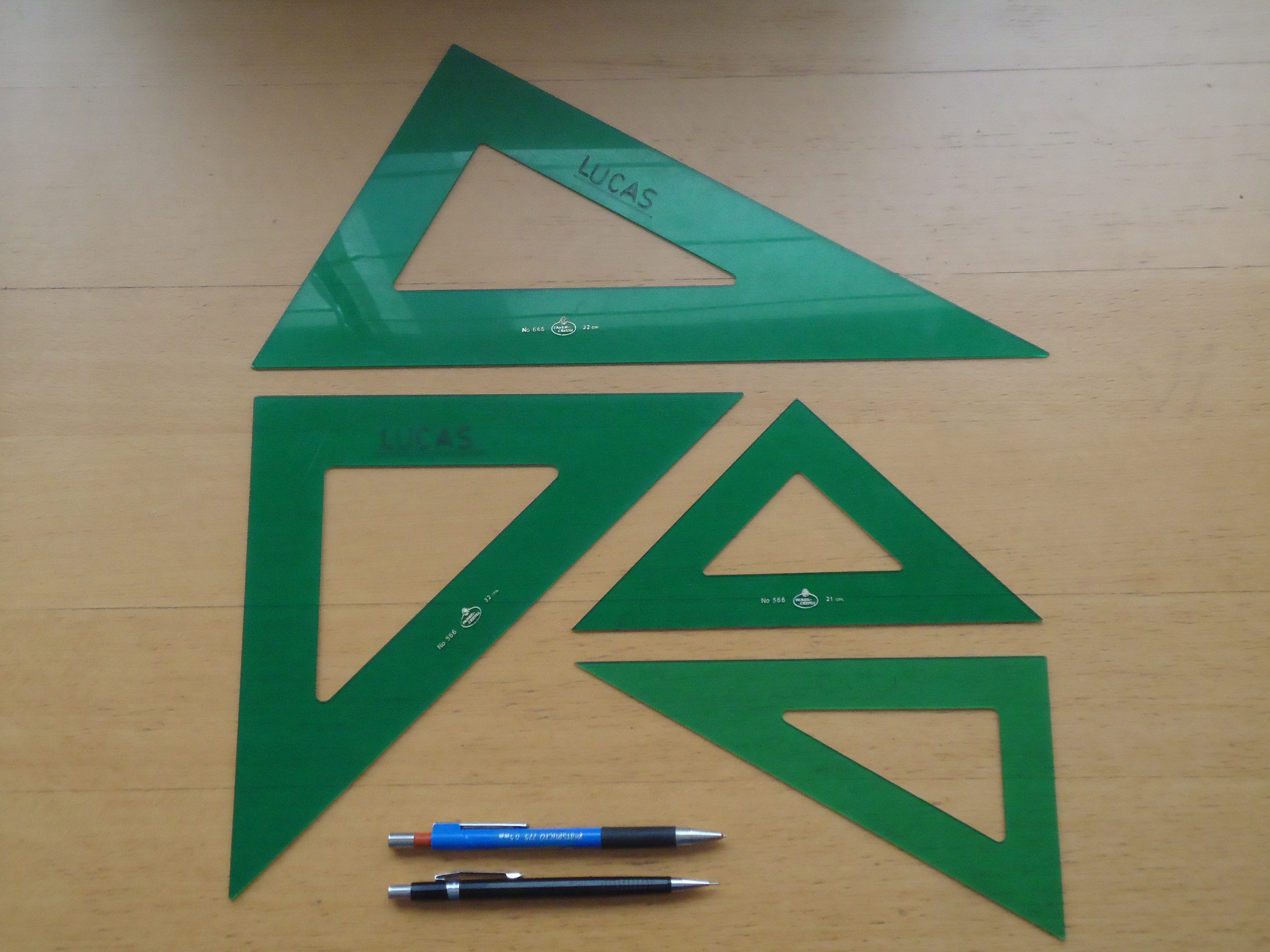 Escuadra y cartabón. Dos juegos de distintos tamaños